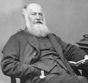 George Snider, M.P. (N. Grey) b. Jan. 31, 1813 - d. 1885